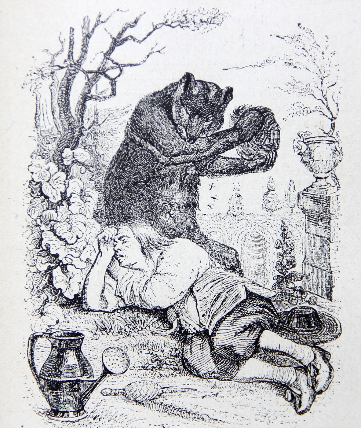 J.J. Grandville. Illustrations des Fables de La Fontaine. 1838-1840.